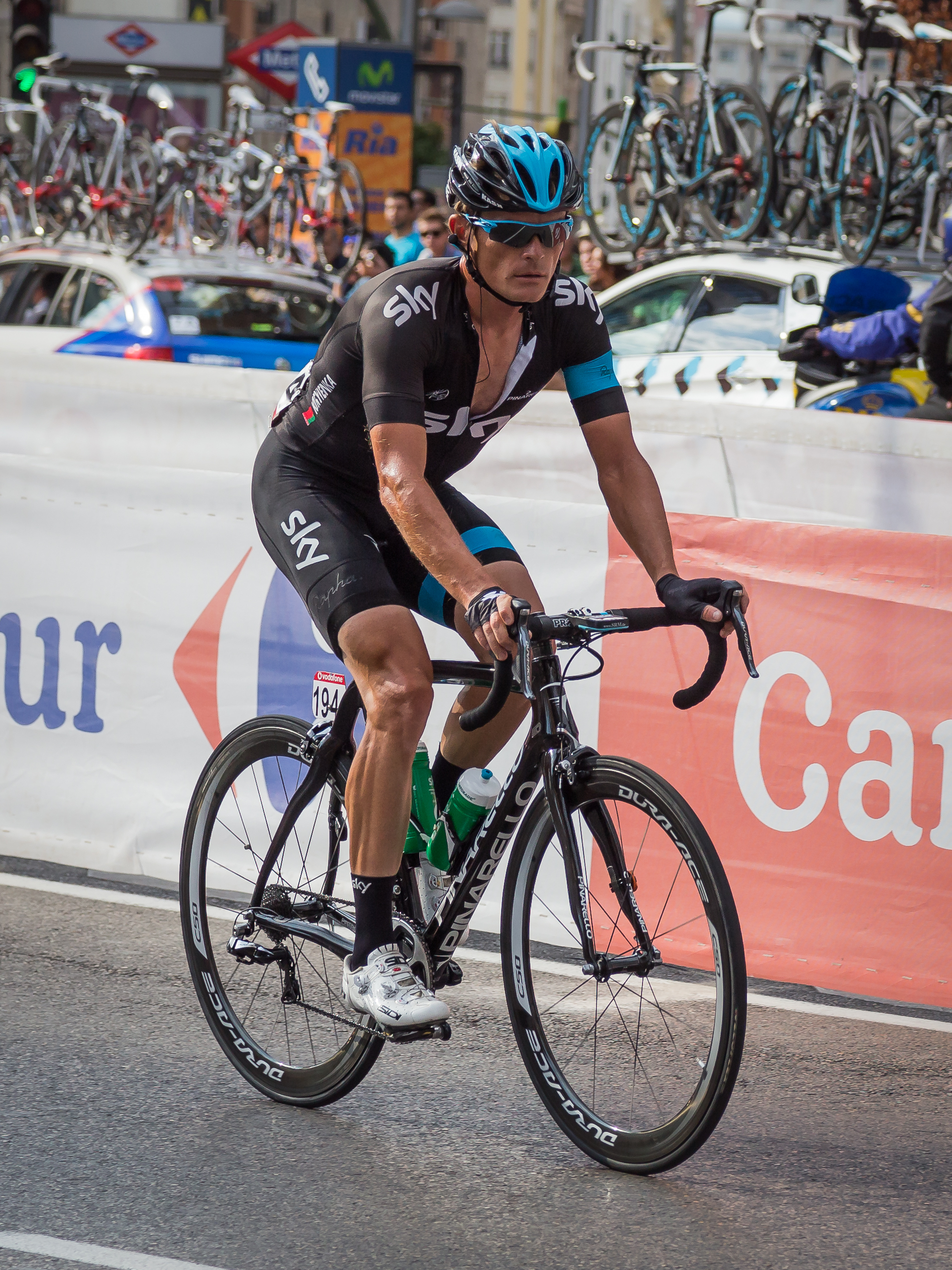 Kiryienka Vasil (#194/Sky Procycling). Última etapa de la Vuelta a España 2013. Madrid.